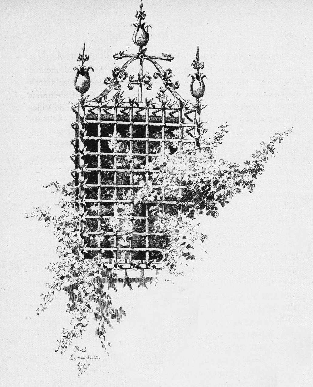 La Minglanilla.